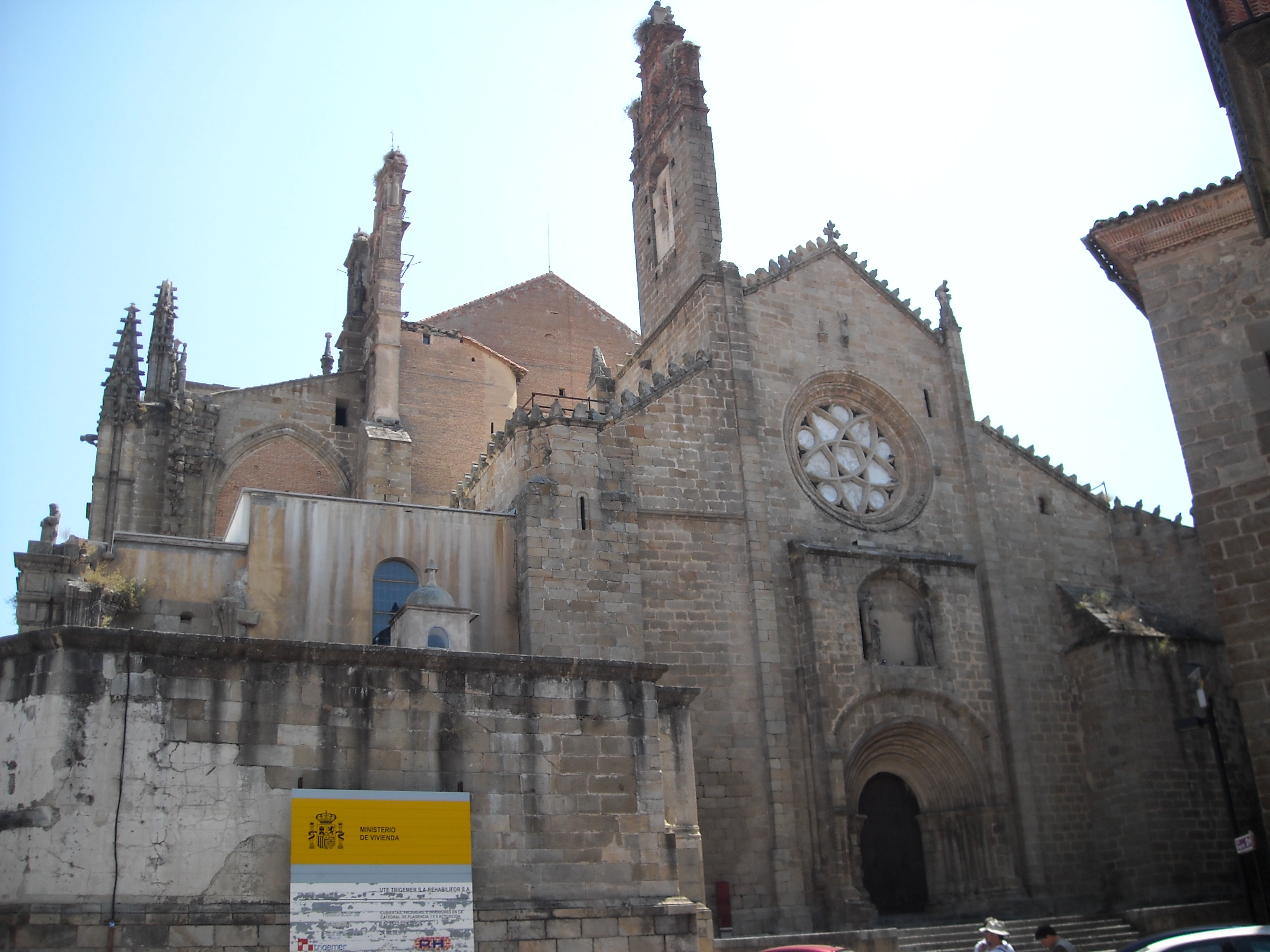 Cattedrale vecchia, Plasencia, Cáceres, Spagna